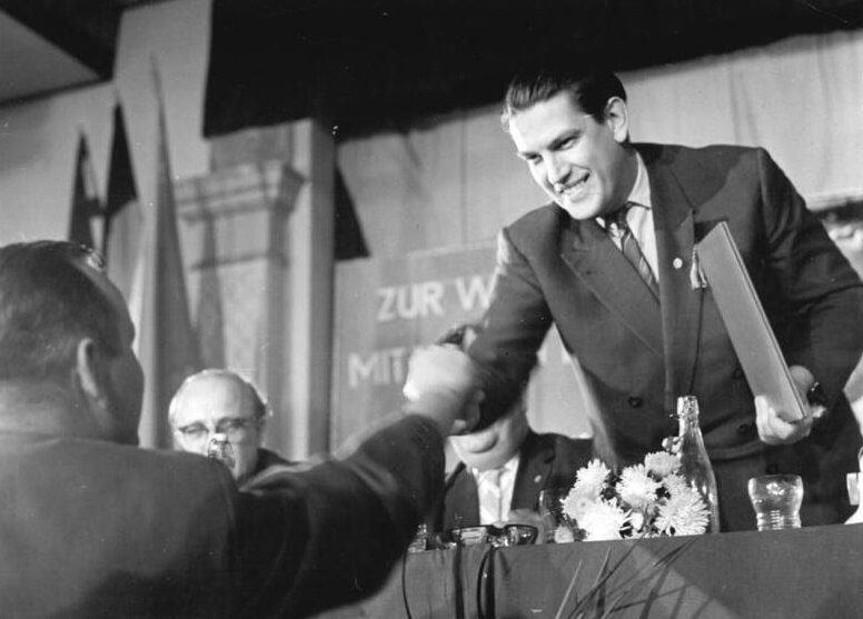 Werneuchen, Bauernforum mit Hans Reichelt Zentralbild Sturm Lüb-Pr 14.9.1961 Bauernreform mit Horst Sindermann und Minister Reichelt in Werneuchen Von den Maßnahmen des 13. August bis zur Initiative der Genossenschaftsbauern von Zickhusen reichte eine Palette von Fragen, die auf einem Forum am 13. September in Werneuchen bei Berlin dem Kandidaten des ZK der SED Horst Sindermann, dem Minister für Landwirtschaft, Erfassung und Forstwirtschaft, Hans Reichelt, dem Mitarbeiter des ZK der SED Dr. Bruno Wagner, sowie Vertretern der örtlichen Partei- und Staatsorgane gestellt wurden. (Näheres siehe ADN-Meldung Nr. 236-171 vom 13.9.61) UBz: LPG-Vorsitzender Randrio übergibt dem Minister eine Erklärung, wonach sich die 5 LPG vom TYP I in Bernau am 17. September zu Ehren der Wahlen zu einer großen LPG TYP I zusammenschließen wollen.